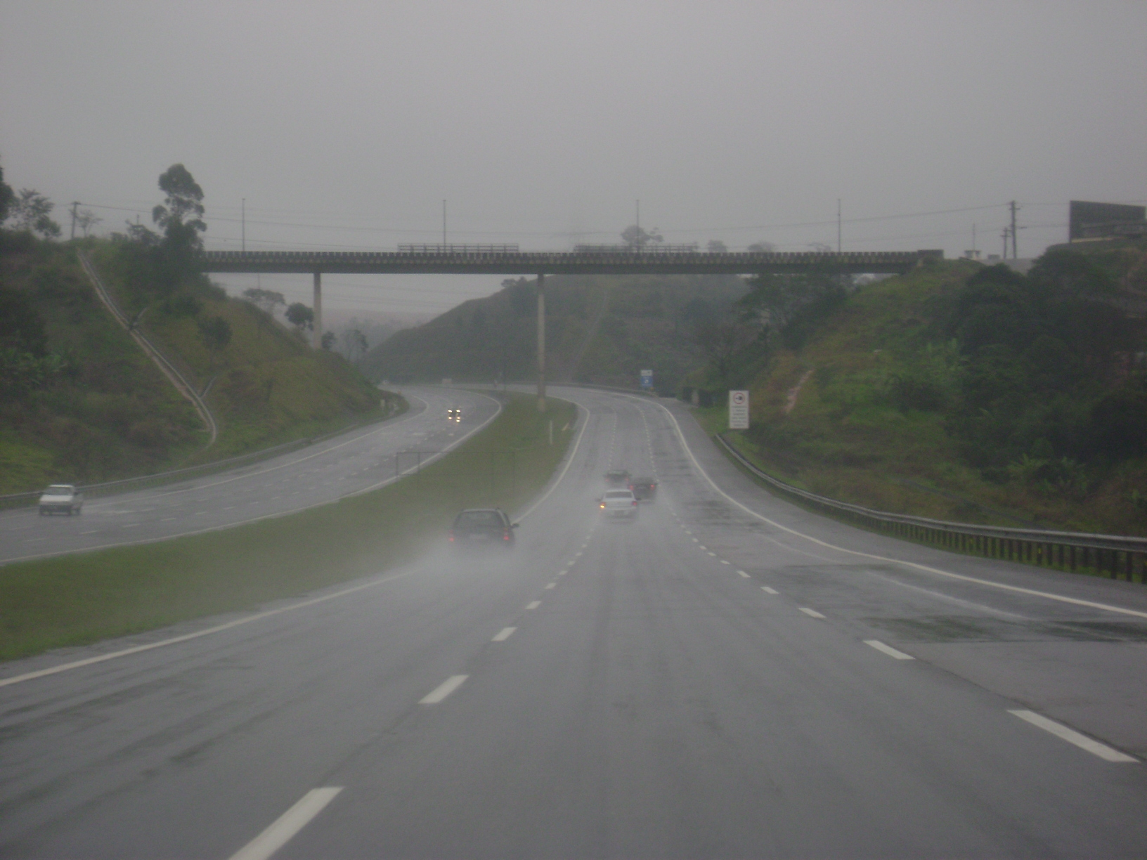 Trecho da Rodovia Ayrton Senna próximo à Itaquaquecetuba.